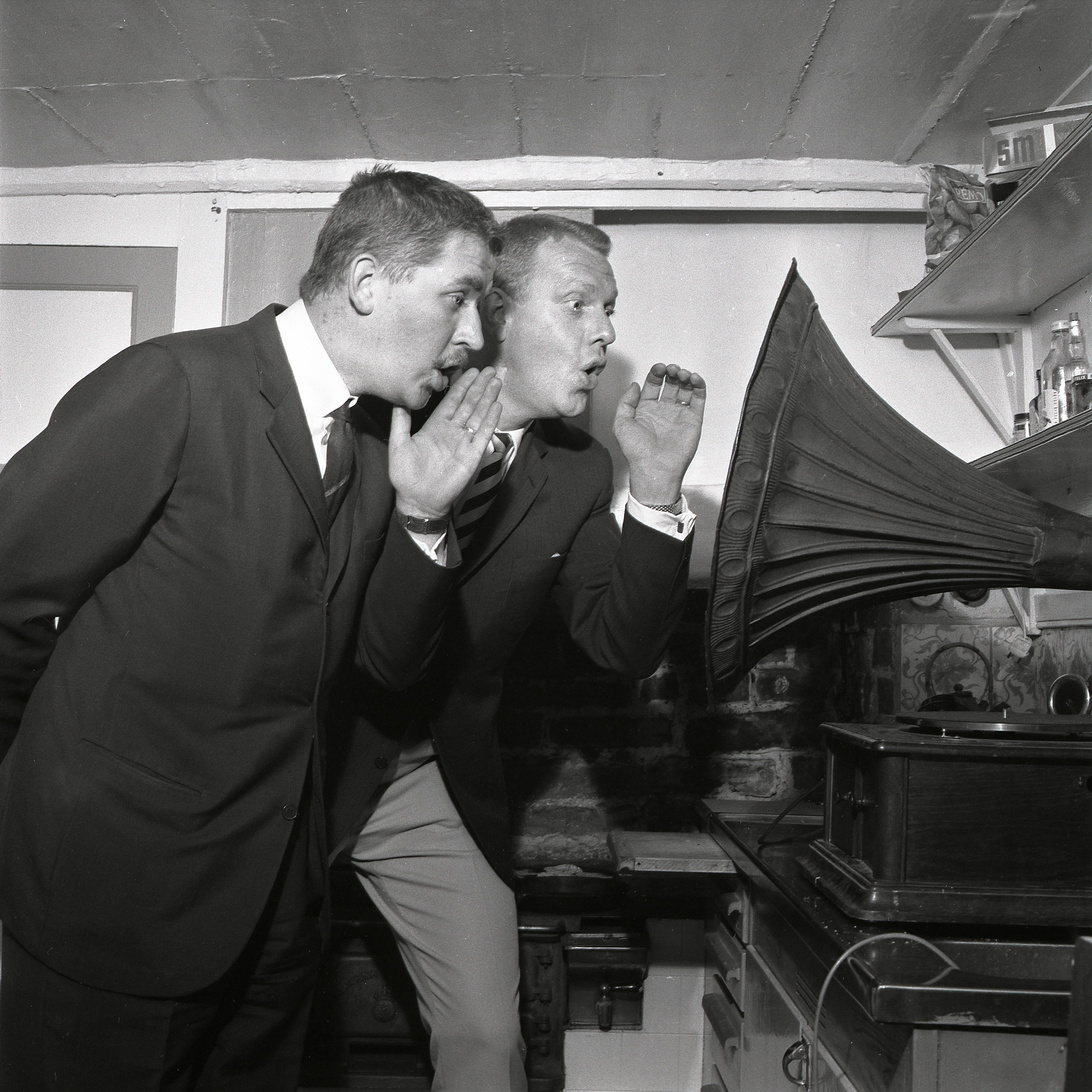 Hans Alfredson och Tage Danielsson i samband med lanseringen av Svenska Ljuds första grammofonskiva som innehöll En torsdagkväll i Vedbæk och Sov lilla Totte. (1962)